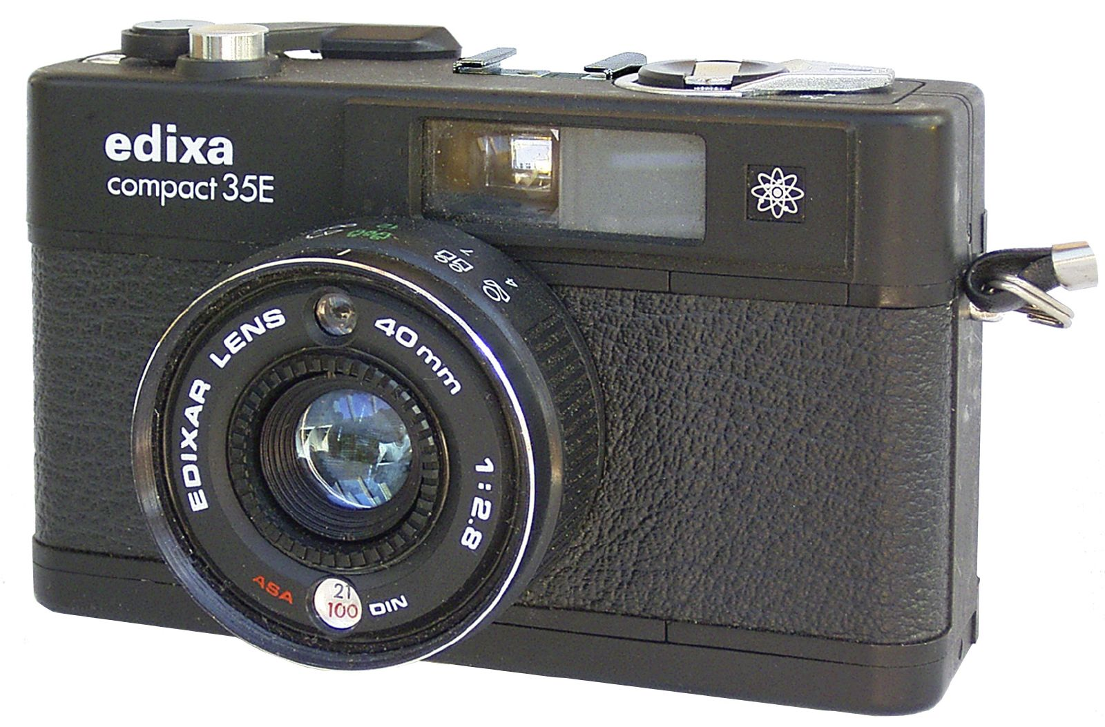 Siehe Konica C35 , die Edixa hat aber keinen Entfernungsmesser und scheint ganz aus Kunststoff zu sein.